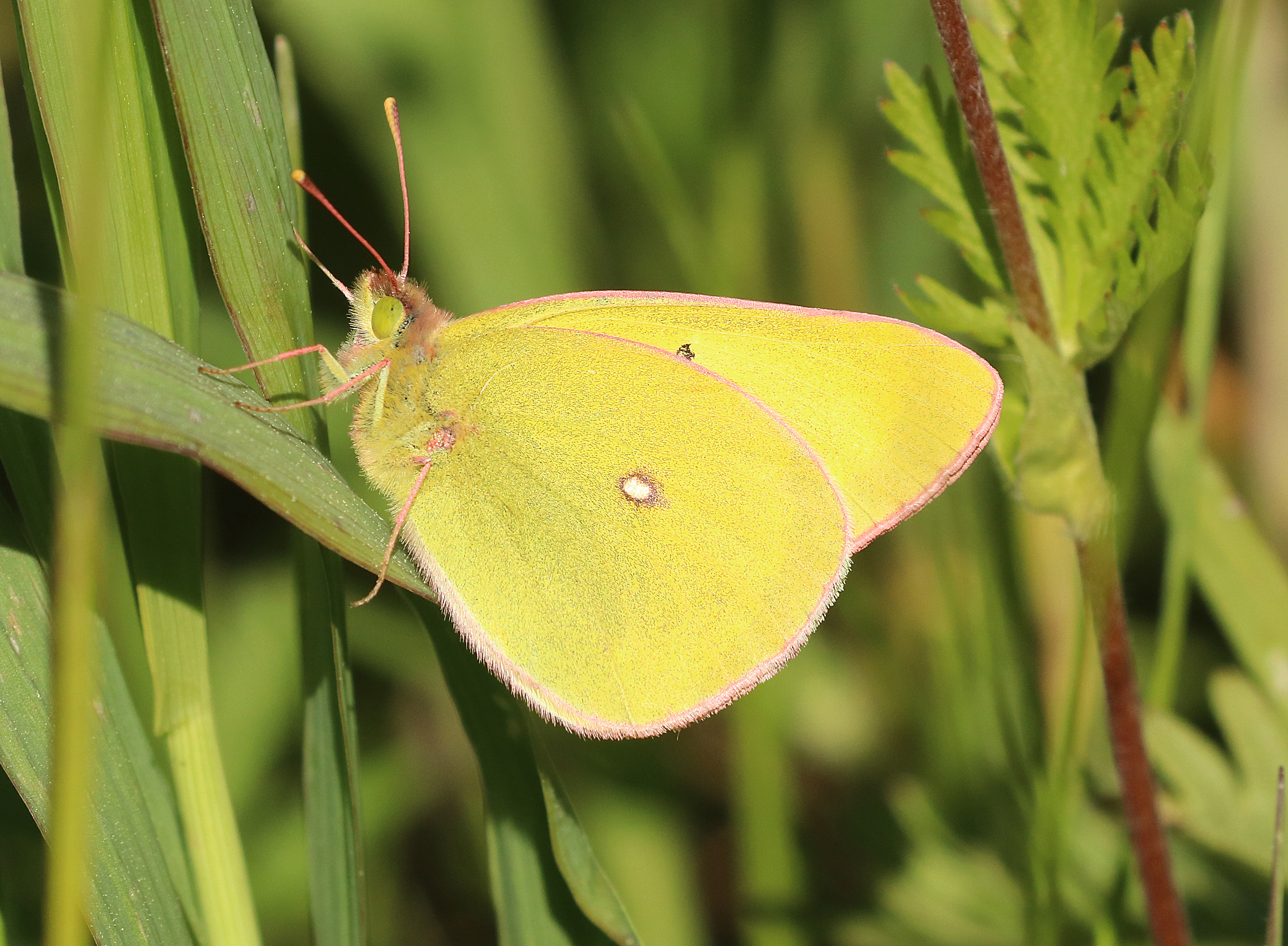 SULPHUR, WESTERN (Colias occidentalis) (6-25-2018) grant co, or -02